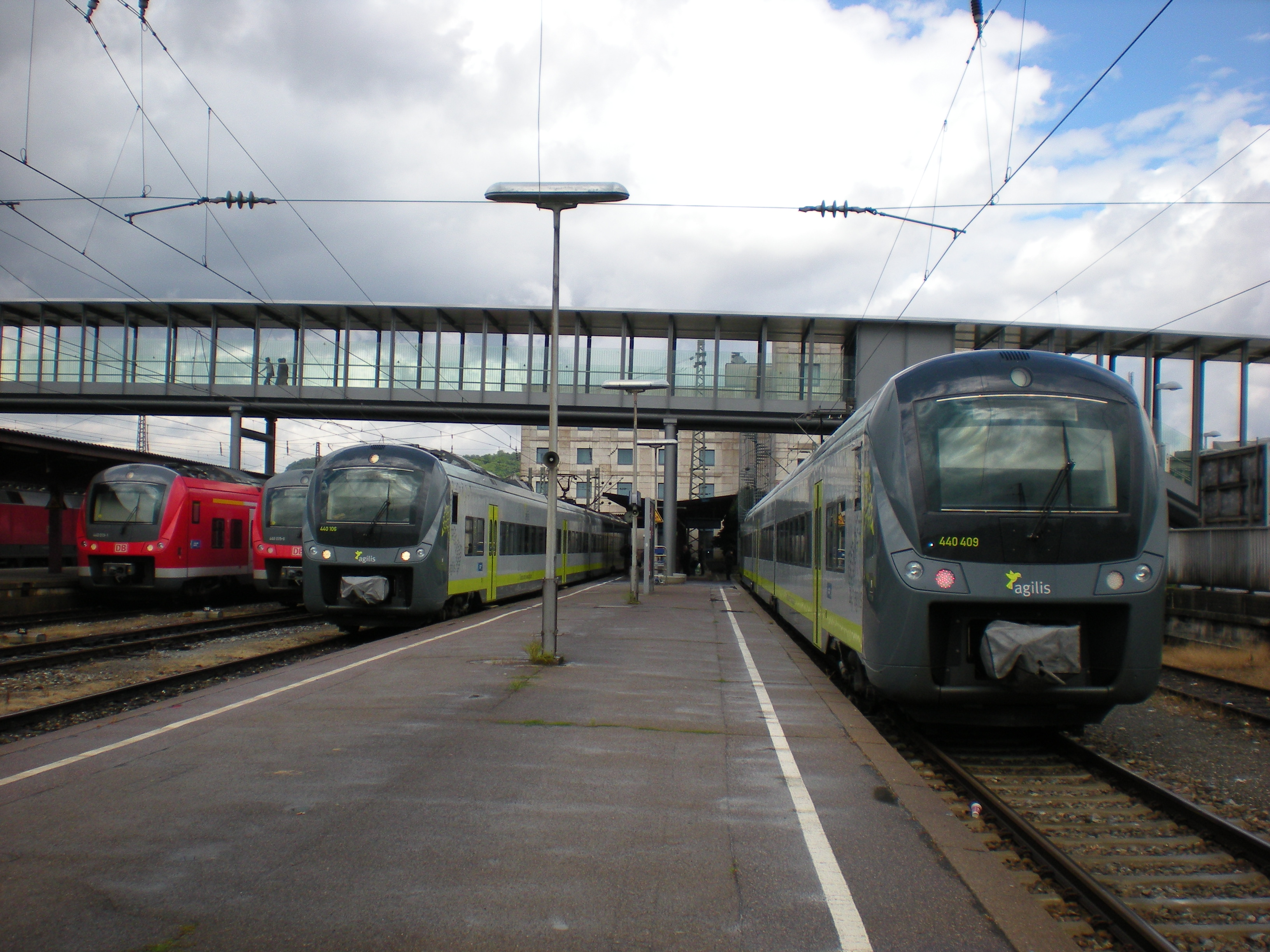 Vier Triebwagen der Bauart Coradia Continental im Bayerischen Bahnhof des Ulmer Hauptbahnhof (links zwei DB-Triebwagen des Fugger-Express, rechts zwei Triebwagen der agilis)